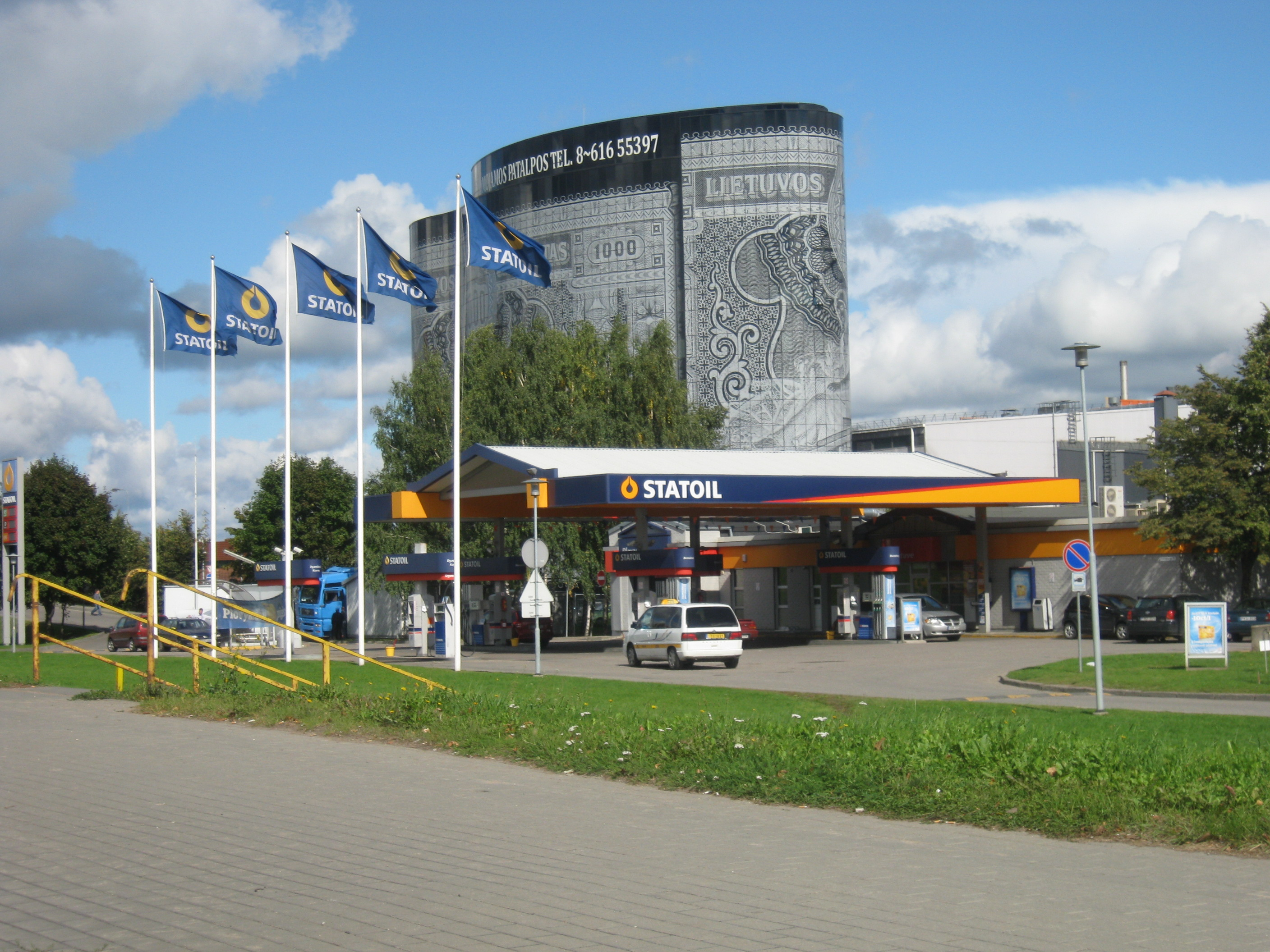 Statoil